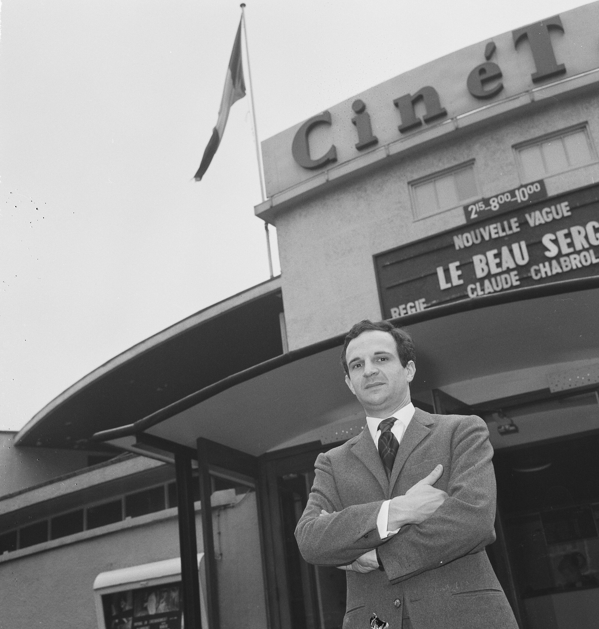 Collectie / Archief : Fotocollectie Anefo Reportage / Serie : [ onbekend ] Beschrijving : Franse regisseur Francois Truffaut voor bioscoop Cinétol, waar zijn film draait [Le Peau Douce?] tijdens Nouvelle Vague festival. [op reclamebord film van Claude Chabrol "Le Beau Serge"] Datum : 15 maart 1965 Locatie : Amsterdam, Noord-Holland Trefwoorden : bioscopen, films, portretten, regisseurs Persoonsnaam : Cinetol, Truffaut, François Fotograaf : Nijs, Jac. de / Anefo Auteursrechthebbende : Nationaal Archief Materiaalsoort : Negatief (zwart/wit) Nummer archiefinventaris : bekijk toegang 2.24.01.03 Bestanddeelnummer : 917-5421